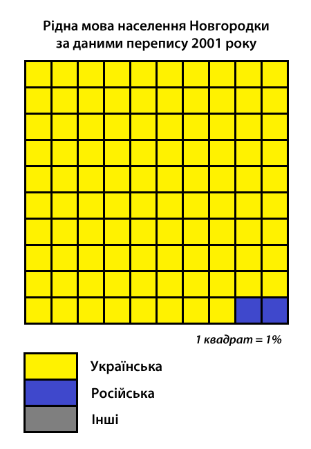 Інфографіка розподілу населення смт Новгородка за рідною мовою згідно з даними перепису 2001 року. Джерело: Розподіл населення Кіровоградської області за рідною мовою (у % до загальної чисельності населення) за переписом 2001 року